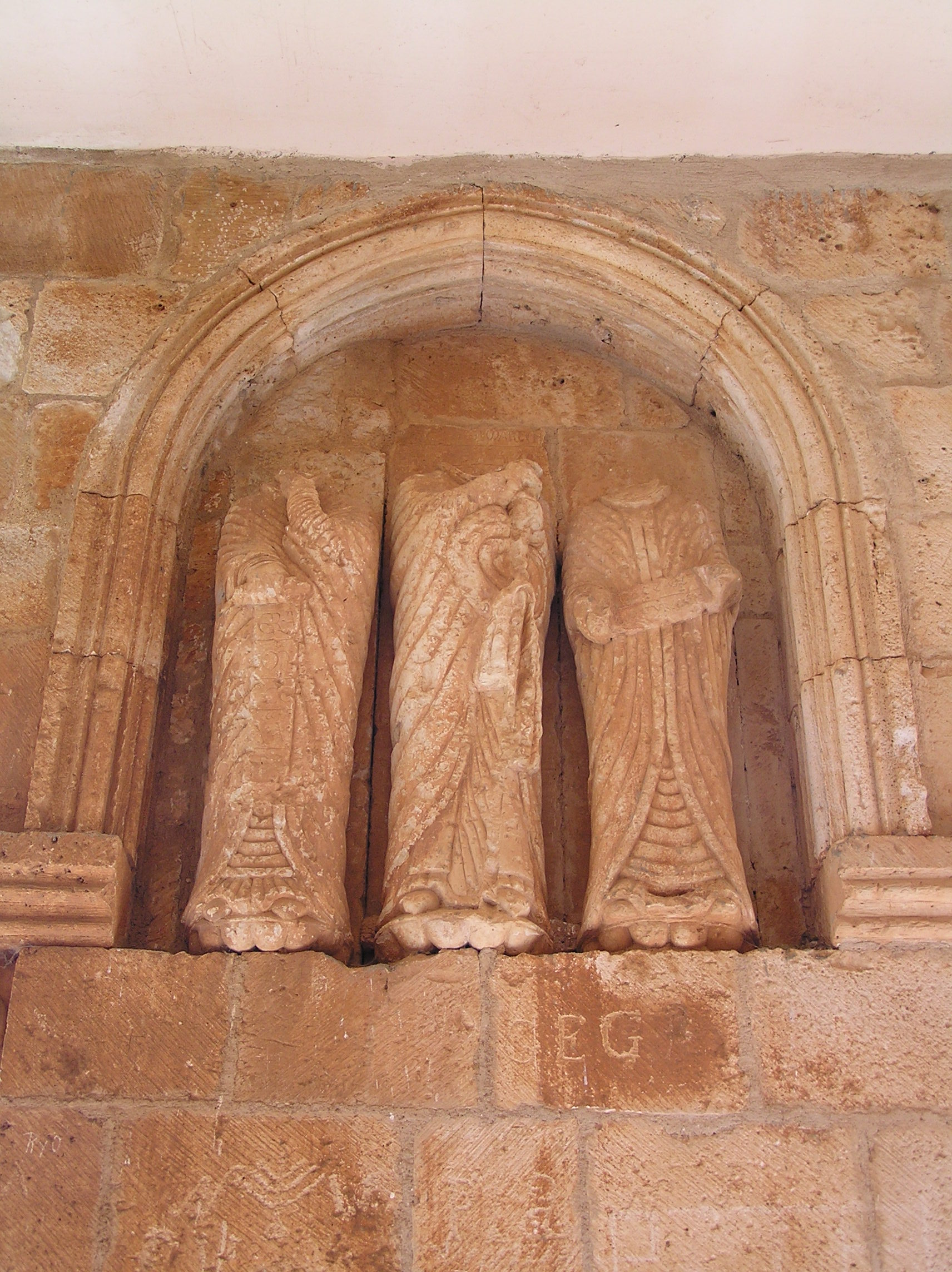 Detalle del atrio de la ermita de Nuestra Señora de Santa María, en Tiermes, Montejo de Tiermes (Soria)